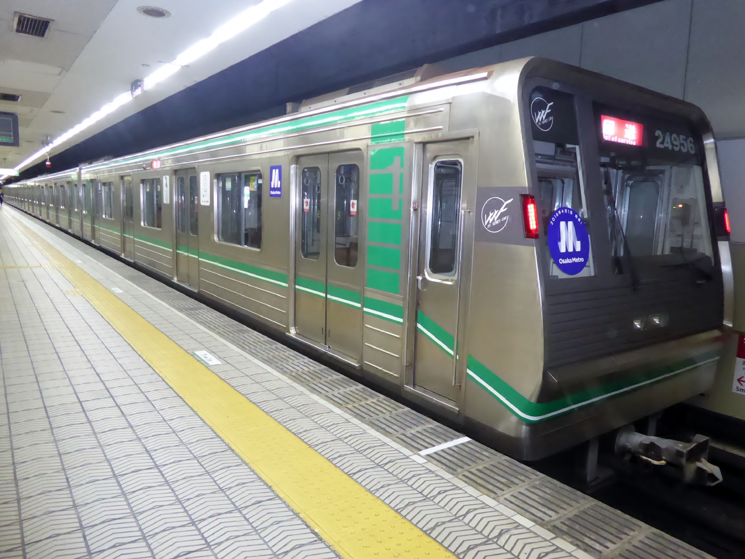 大阪市高速電気軌道24系24956号車輛を撮影。